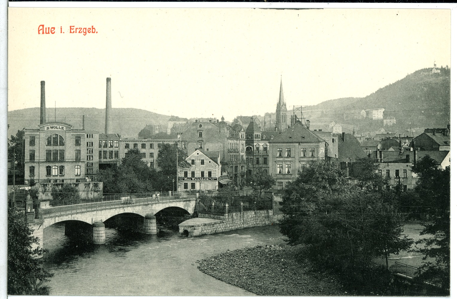 Aue; König Albert Brücke This postcard is from publisher Brück & Sohn in Meißen ( postcard has a unique number 10765 and is available in a higher resolution at the publisher. This images was uploaded in a cooperation project between Wikipedians and the publisher.